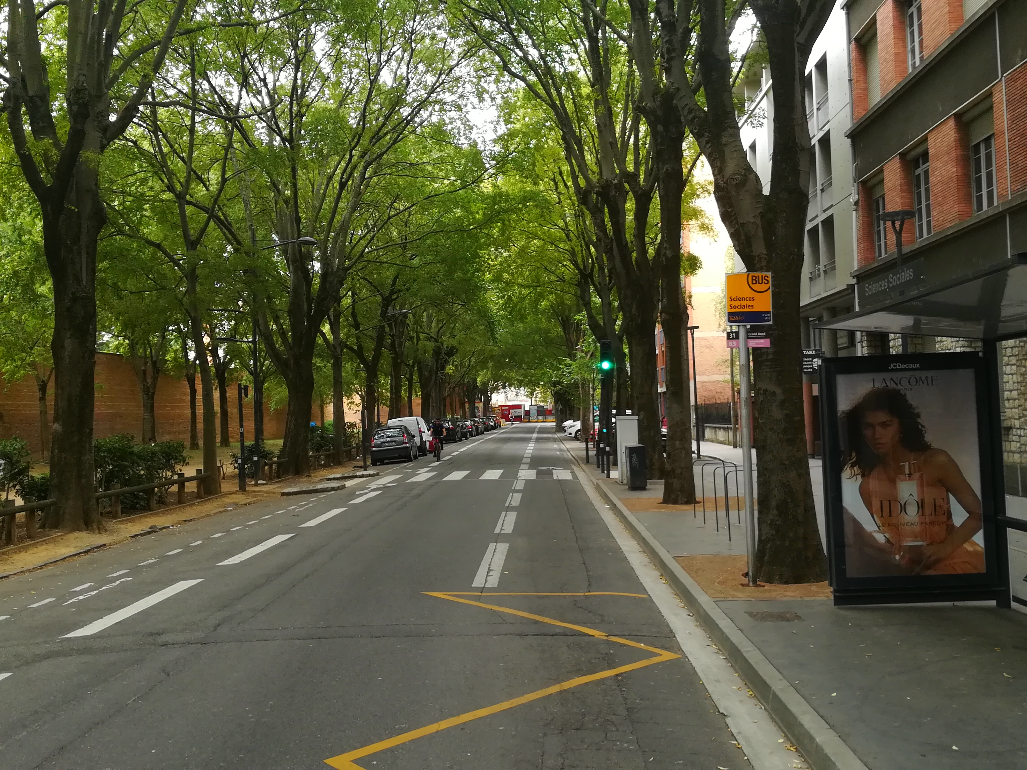 Le boulevard Armand Duportal à Toulouse.